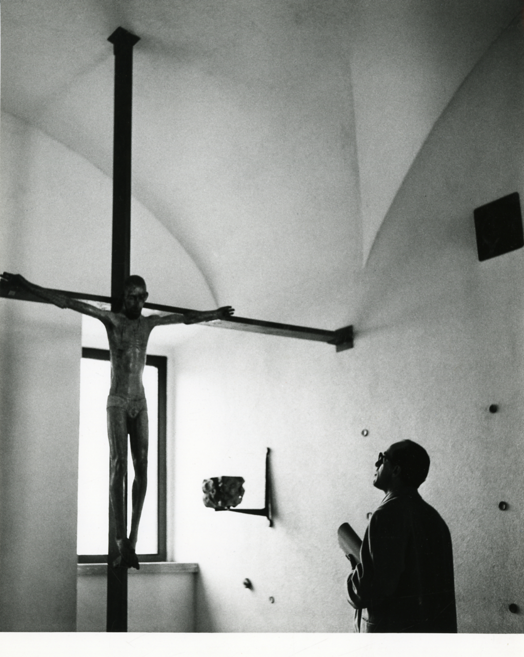 Servizio fotografico : Milano, 1956 / Paolo Monti. - Stampe: 3 : Positivo b/n, gelatina bromuro d'argento/ carta, 24x30. - ((Al verso delle stampe manoscritti i numeri dei negativi corrispondenti: 14001, 14011. . - Una stampa senza numero identificativo è firmata al verso e timbro a inchiostro con copyright: "Foto Fotogramma s.r.l./ [...] Via V. Colonna [...]/ Milano". - Sul coperchio della scatola iscrizione didascalica manoscritta a pennarello nero: "Milano". - Fonte: Quaderno di Paolo Monti: Monti (s.d.), presso Archivio Paolo Monti. Note tecniche ed elenco soggetti con relativa numerazione